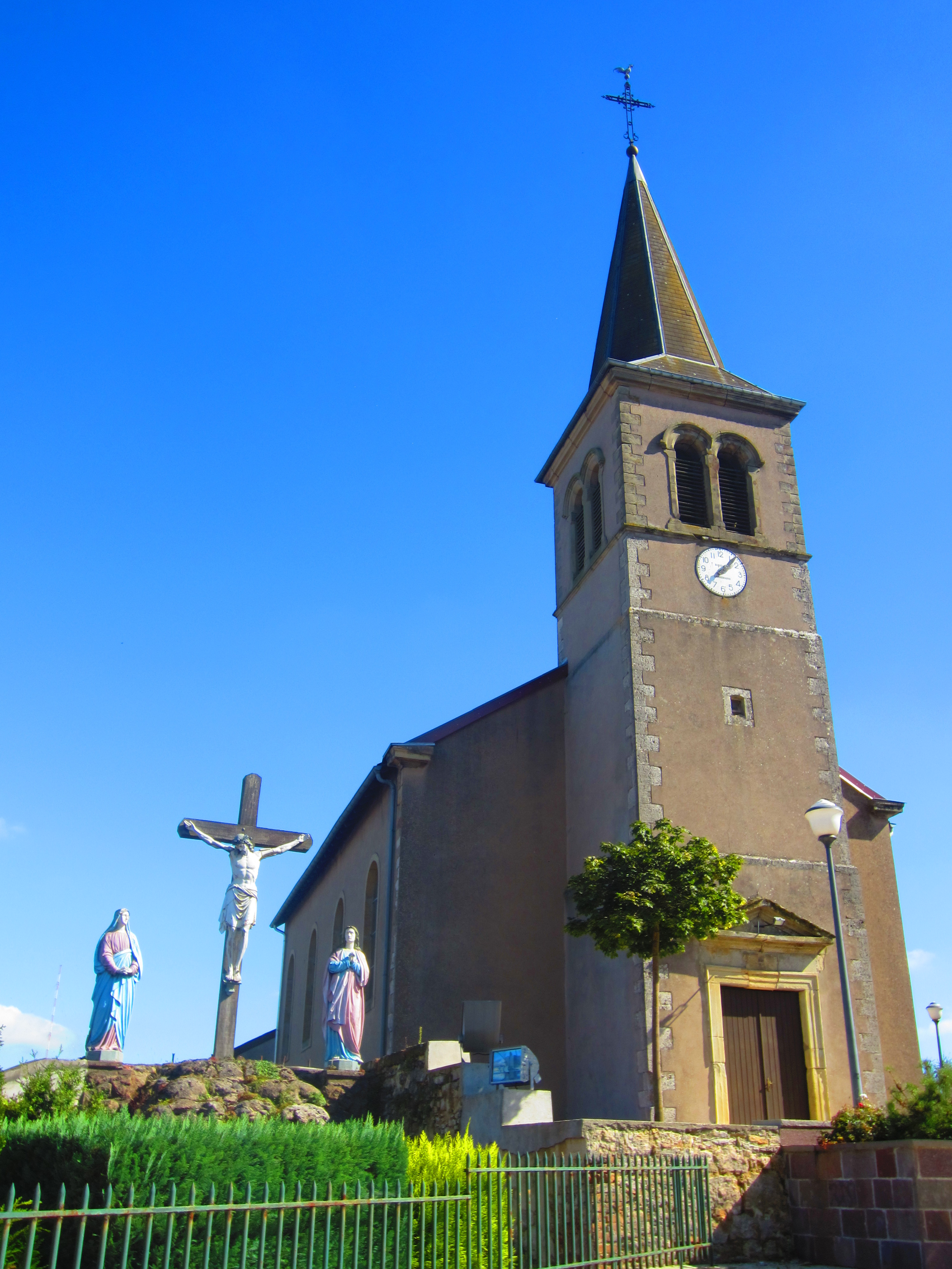 Eglise Villing